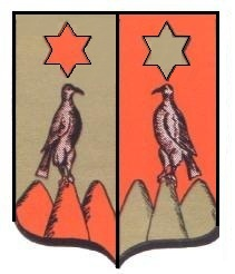 Blason du vicomte Adrien Ange Walckiers de Tronchiennes (dernier seigneur d'Evere)